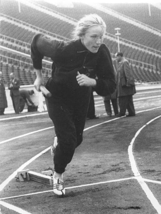 Gisela Henning Zentralbild Wendorf 5.9.1956 Letzte Vorbereitungen für Melbourne. Am Sonnabend, dem 1.9.1956, wurden im Zentral-Stadion in Leipzig die letzten Ausscheidungsläufe für die 4x100m-Staffel der Damen durchgeführt. UBz:Gisela Henning beim Starttraining.